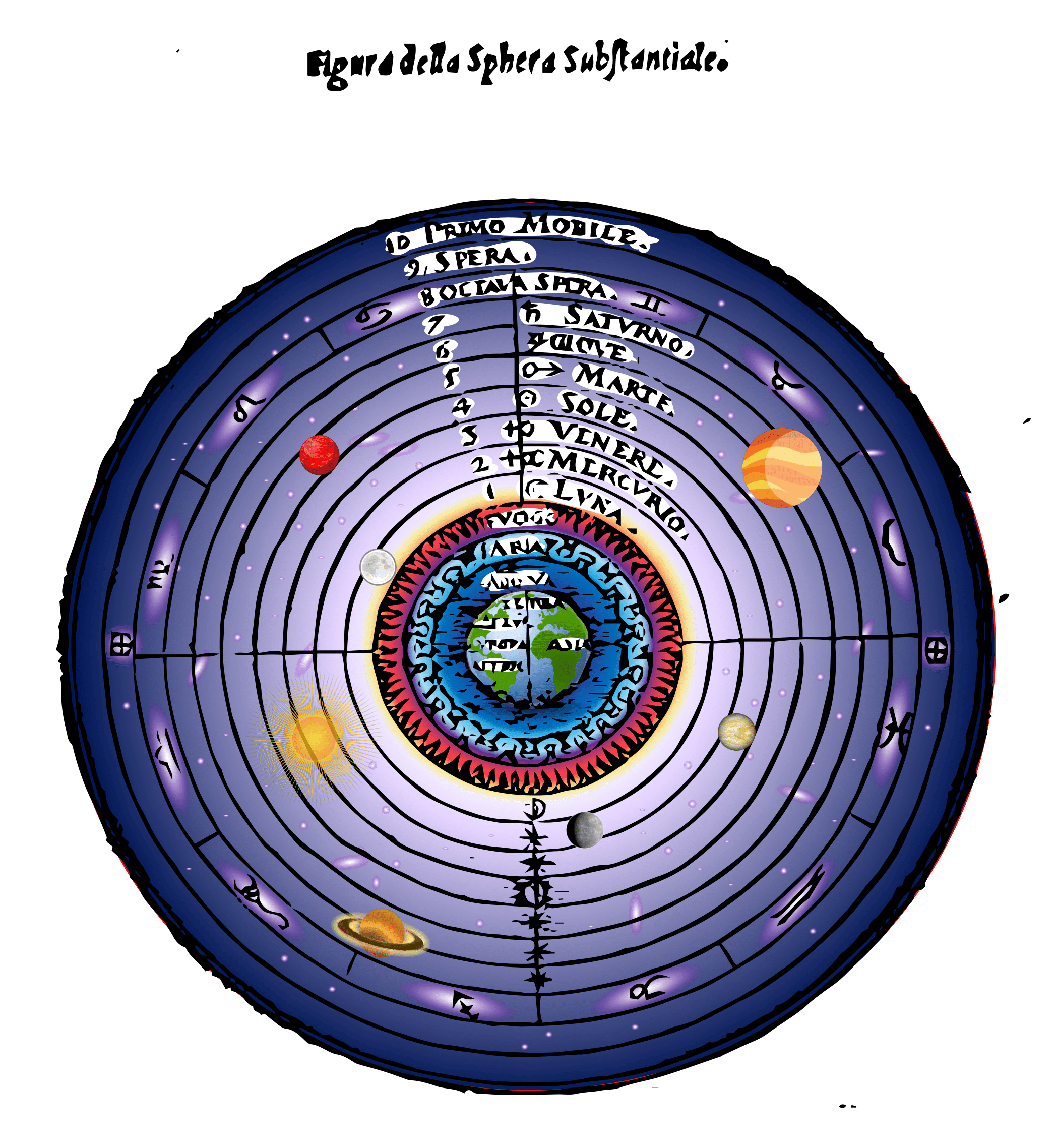 Representación coloreada del cósmos geocéntrico aristotélico. Imagen original: 10 Décimo cielo, primera causa · 9 Noveno cielo, cristalino · 8 Octavo cielo del firmamento · 7 El cielo de Saturno · 6 Júpiter · 5 Marte · 4 Sol · 3 Venus · 2 Mercurio · 1 Luna